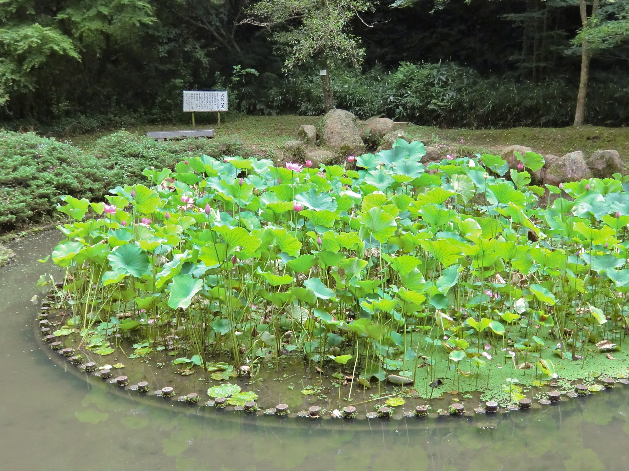 周南緑地公園の西緑地に植えられている大賀ハス（山口県周南市）